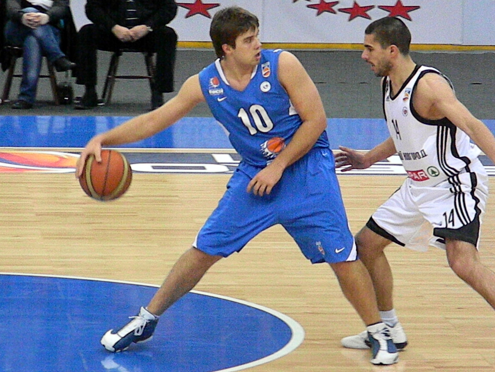 Pavel Sergeyev vs Nemanja Protić